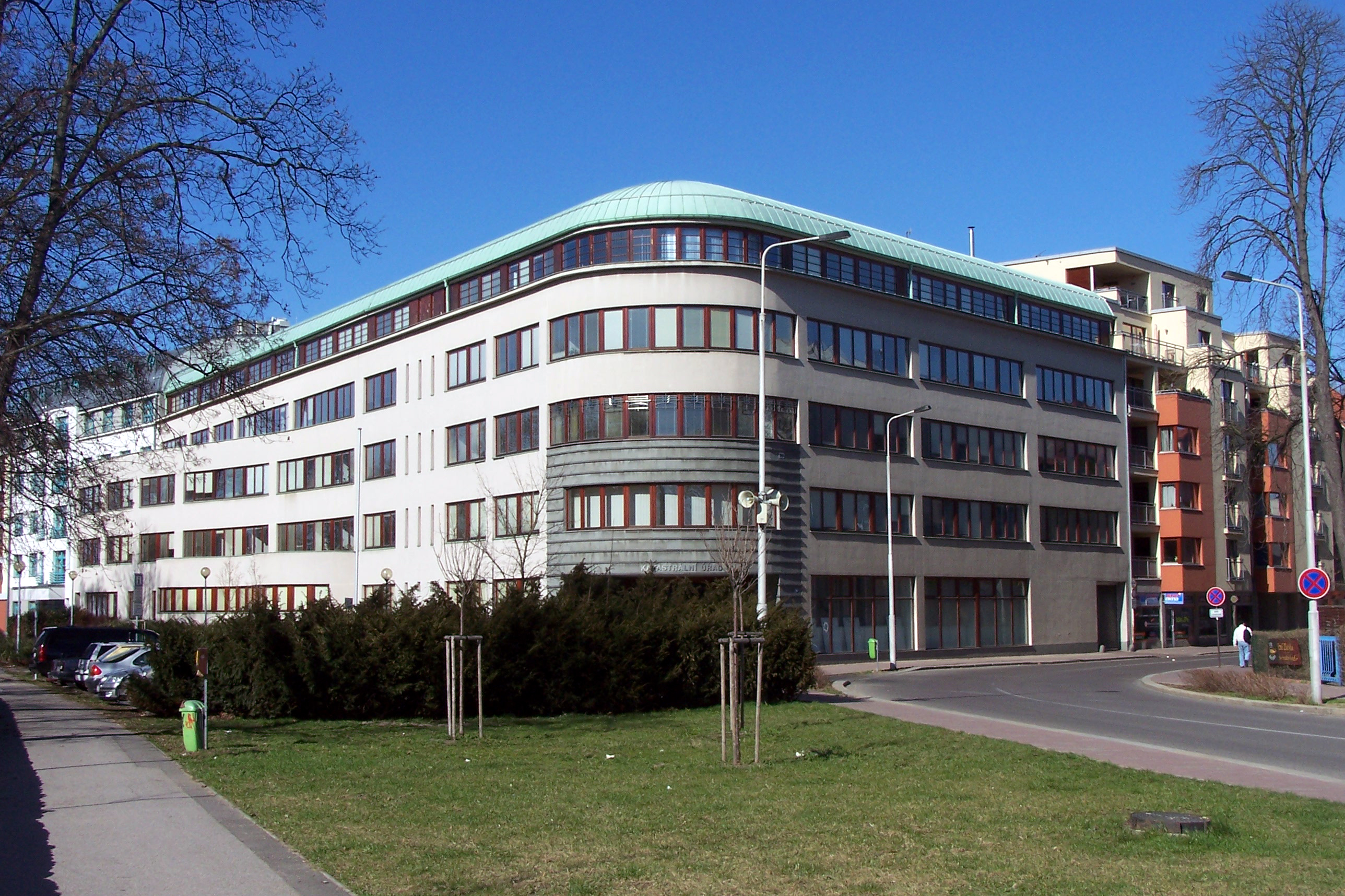 Pardubice I-Bílé Předměstí, Čechovo nábřeží 1791, katastrální úřad pro Pardubický kraj.